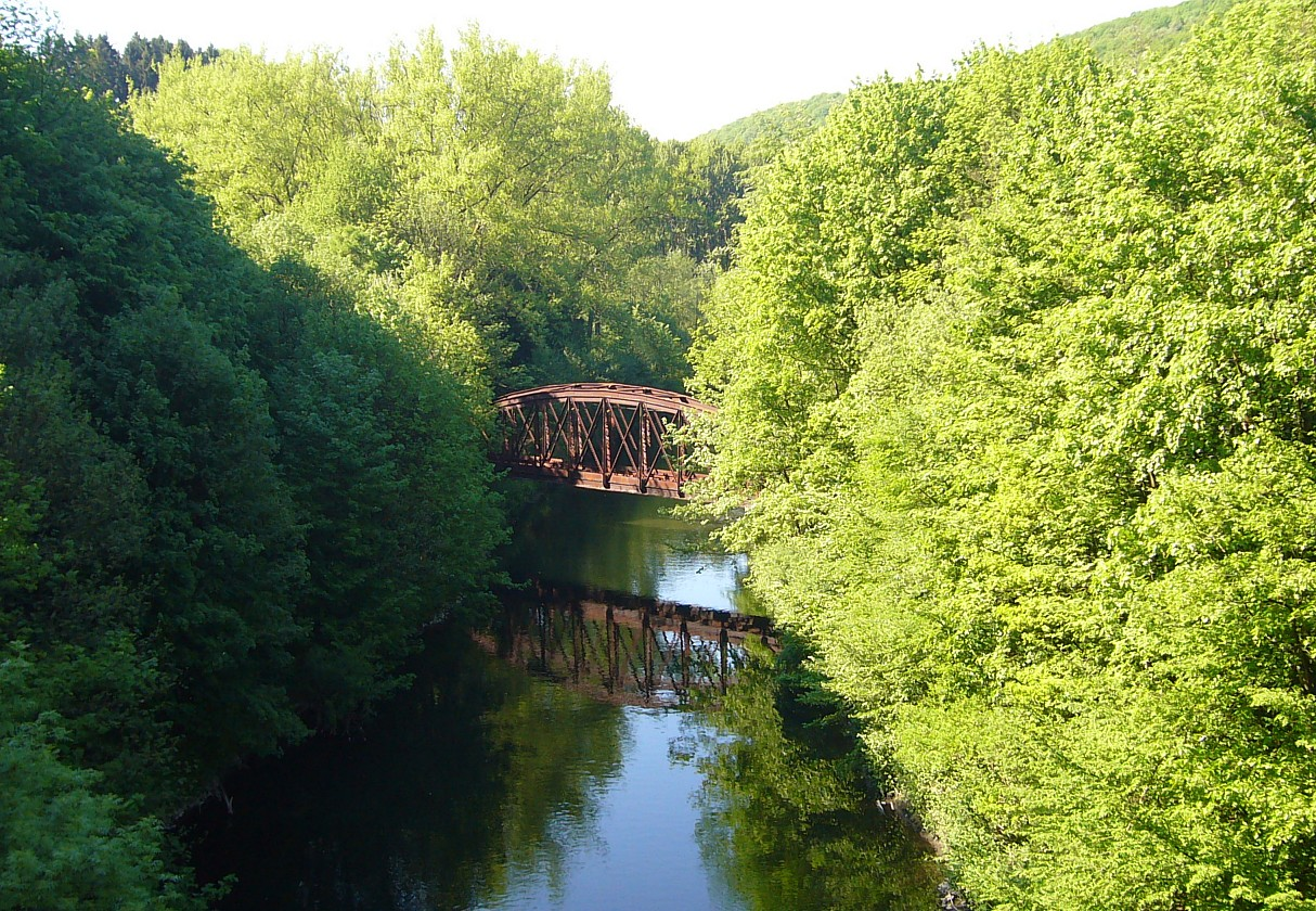 alte Bahnbrücke der Schmalspurbahn bei Müngsten